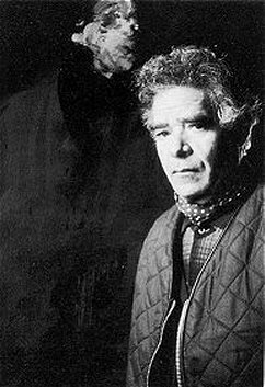 Ibrahim Shahda devant un autoportrait